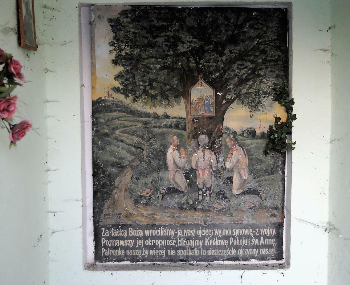 Wnętrze tej kapliczki z historią jej powstania